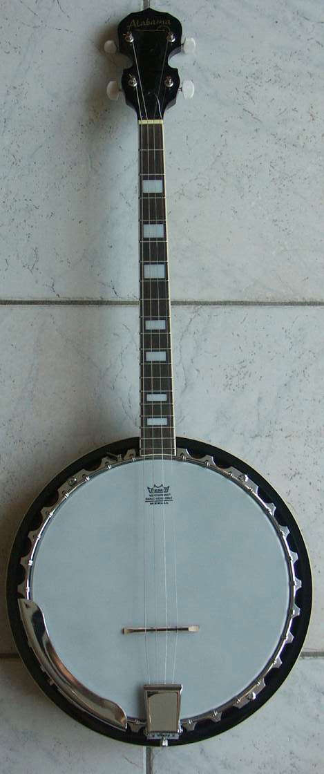 Photo personnelle d'un banjo prise par Tipiac en juin 2004.